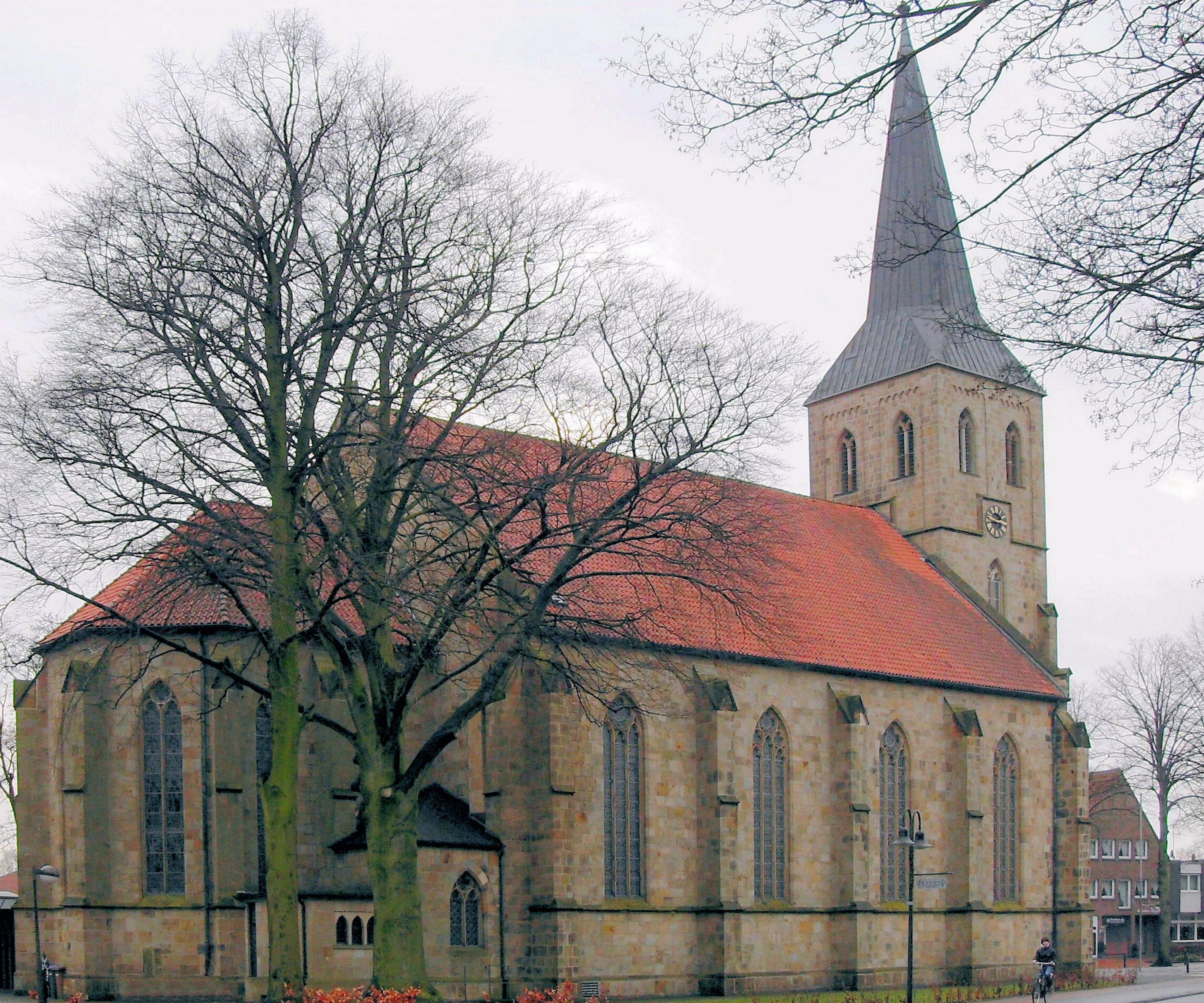 Nordseite der Kirche St. Petronilla in Wettringen, Münsterland